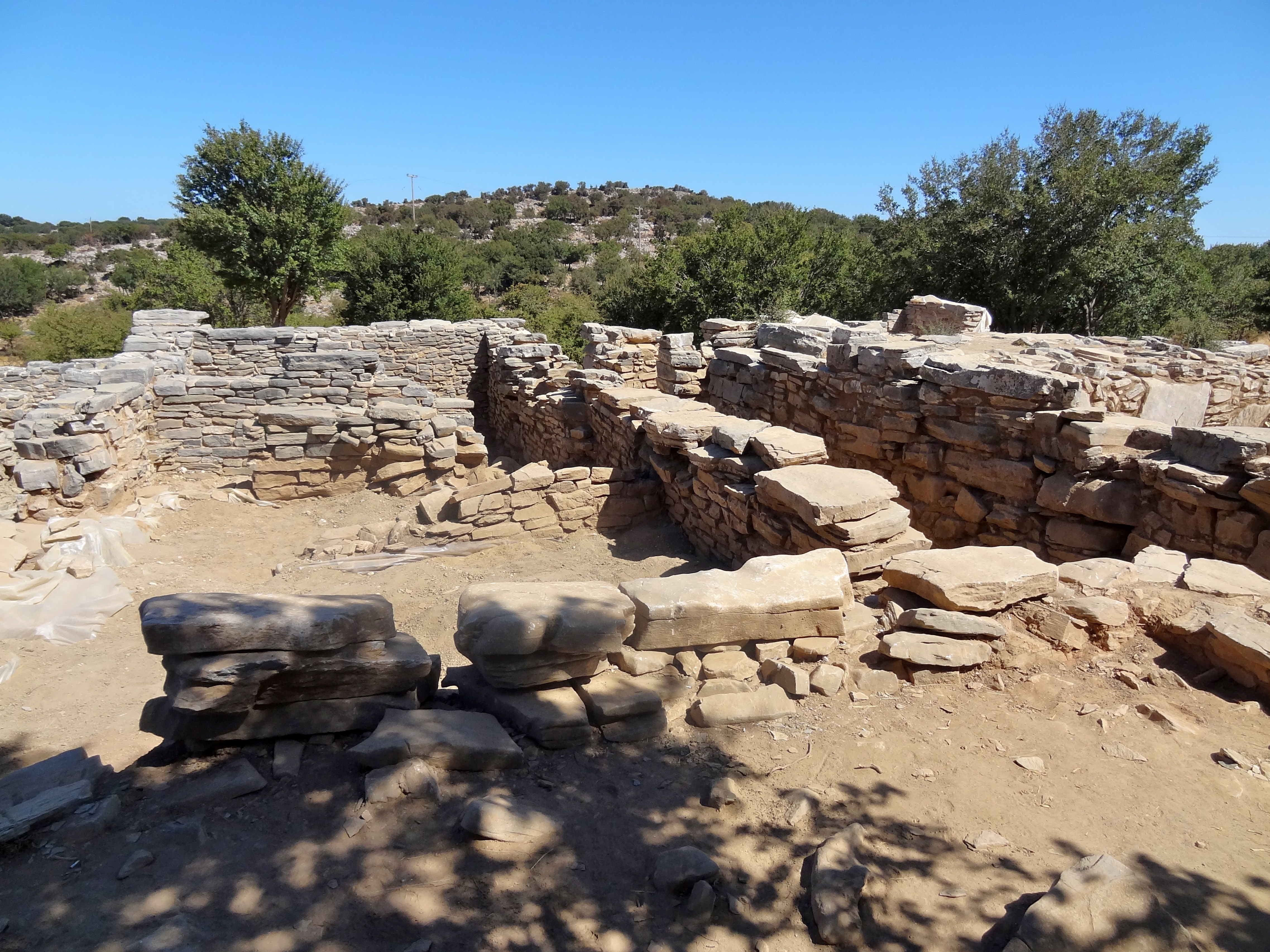 Ausgrabungsstätte von Zominthos, Gemeinde Anogia, Kreta, Griechenland